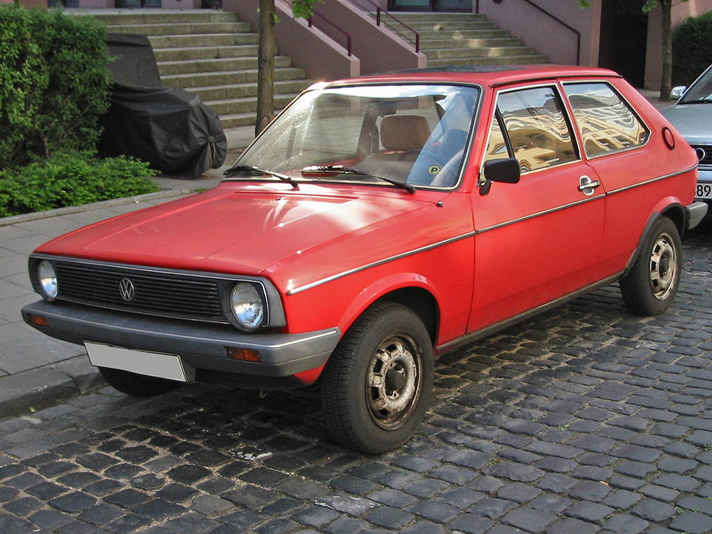 VW Polo 1